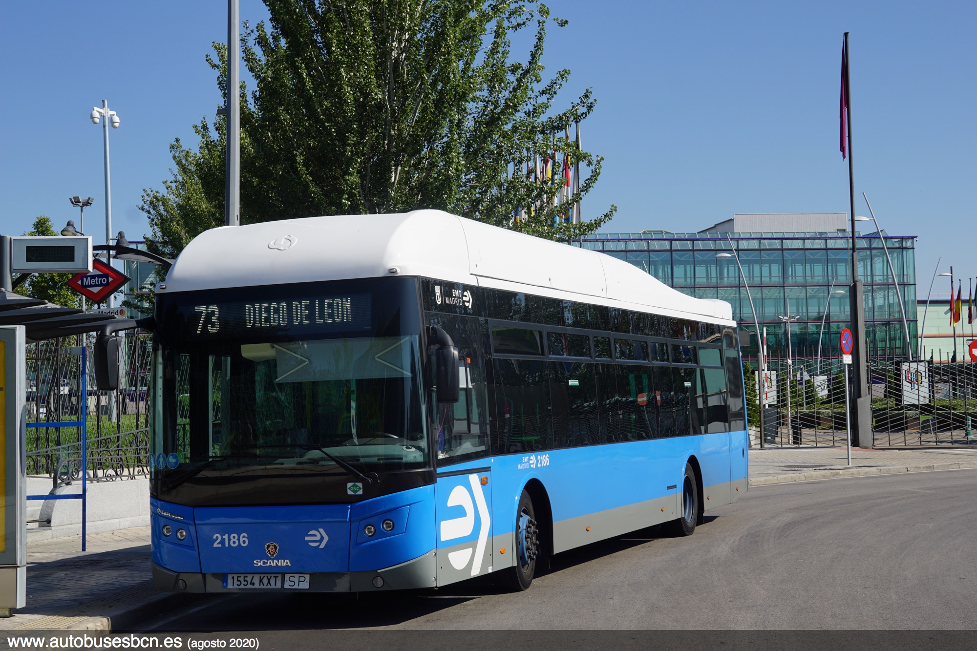 Final de la línea 73 EMT Madrid en la Feria de Madrid, agosto 2020